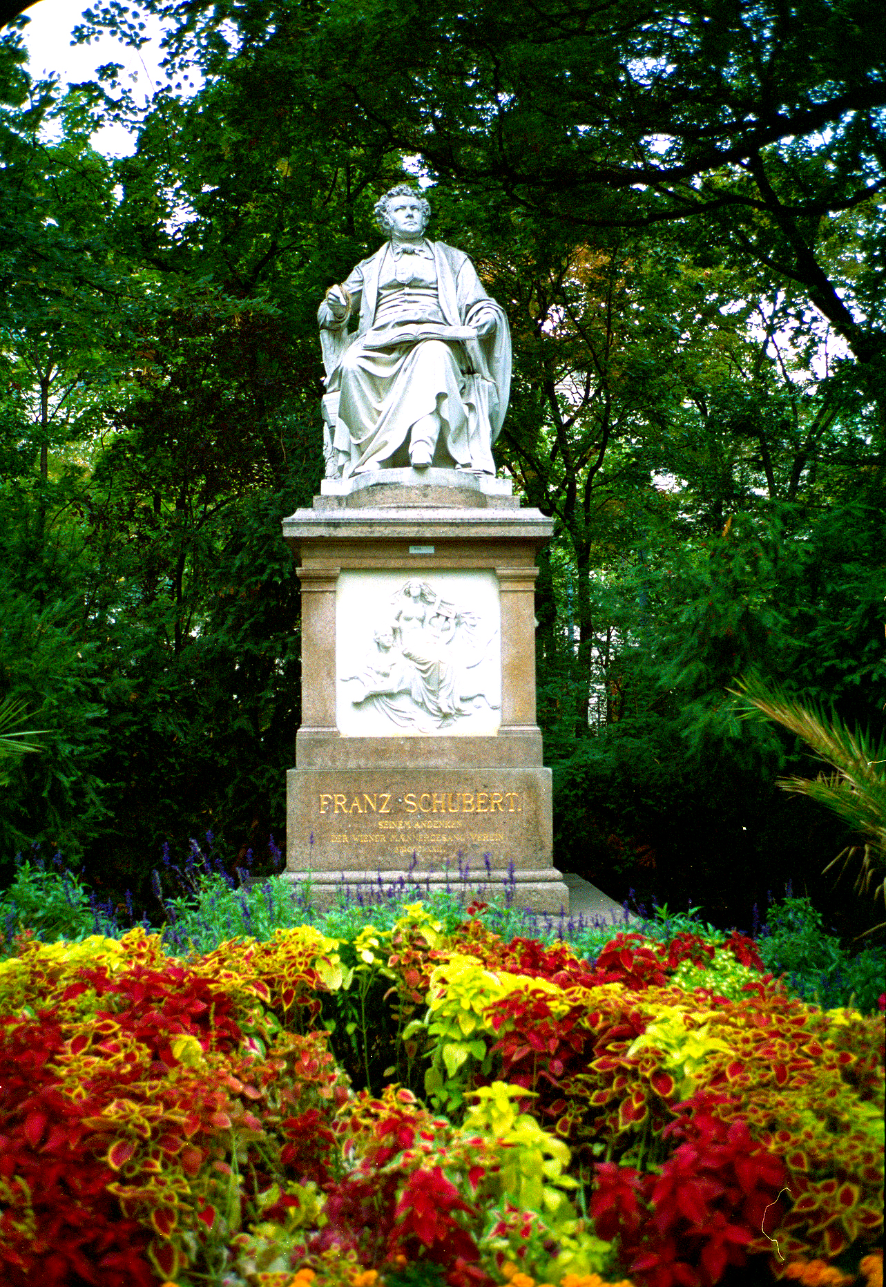 Wien, Stadtpark, Schubert-Denkmal von Carl Kundmann, 1872, Sockel von Theophil von Hansen.